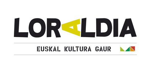 Loraldiaren irudia